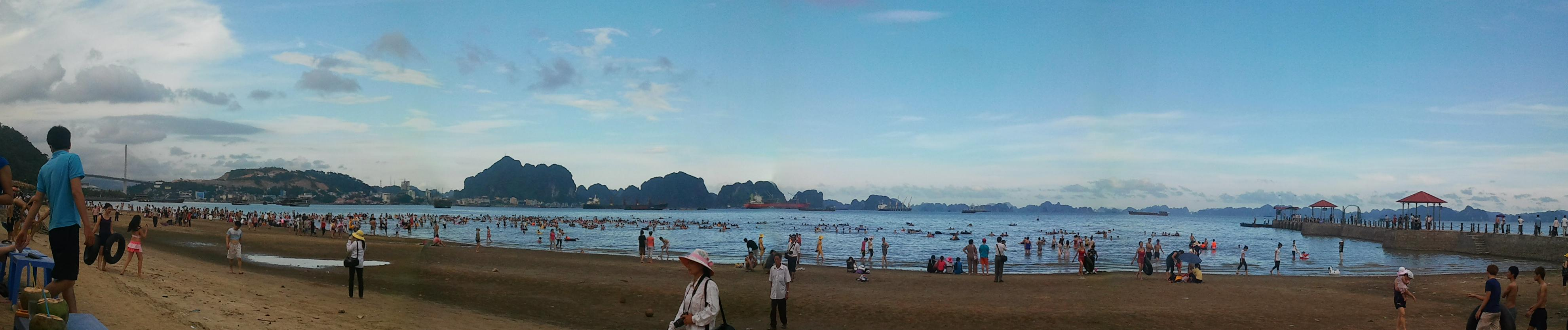 Bãi tắm Bãi Cháy về chiều